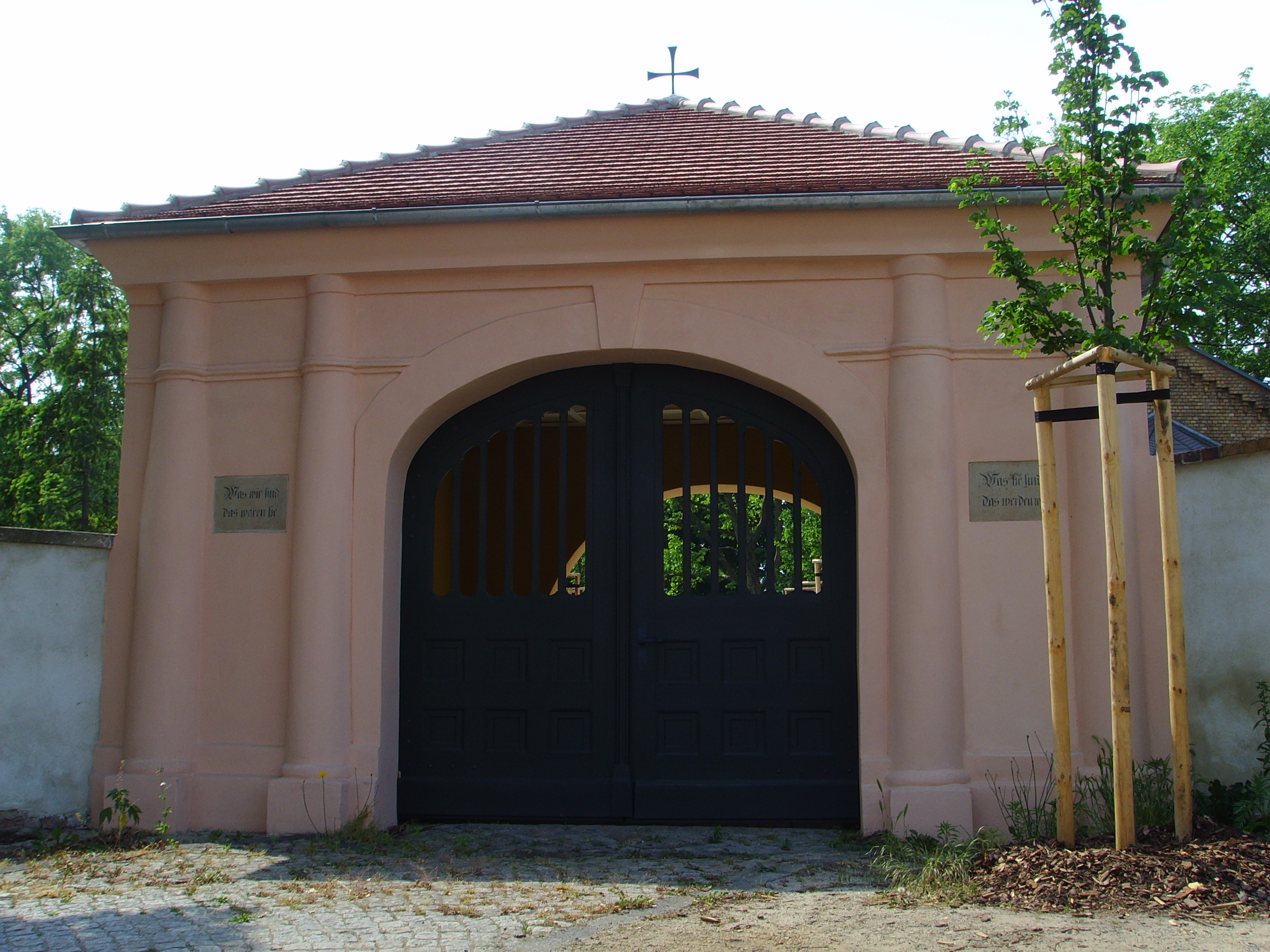 Eingangsportal zum Alten Friedhof in Senftenberg